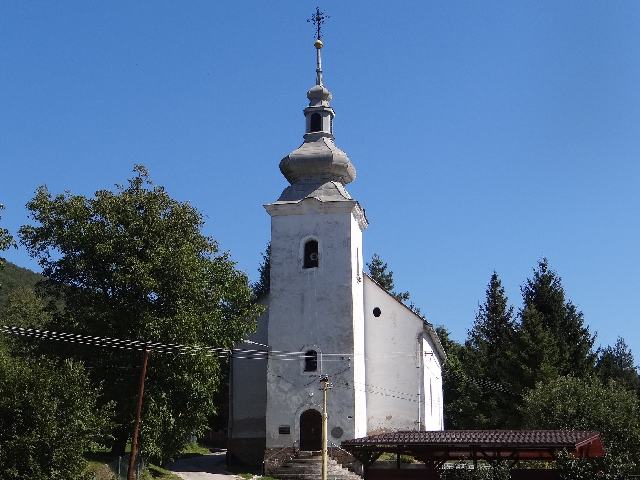 Rožňavské Bystré